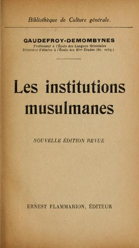 Frontispicio da Obra Instituições Muçulmanas de Maurice Gaudefroy-Demombynes (1862-1957)